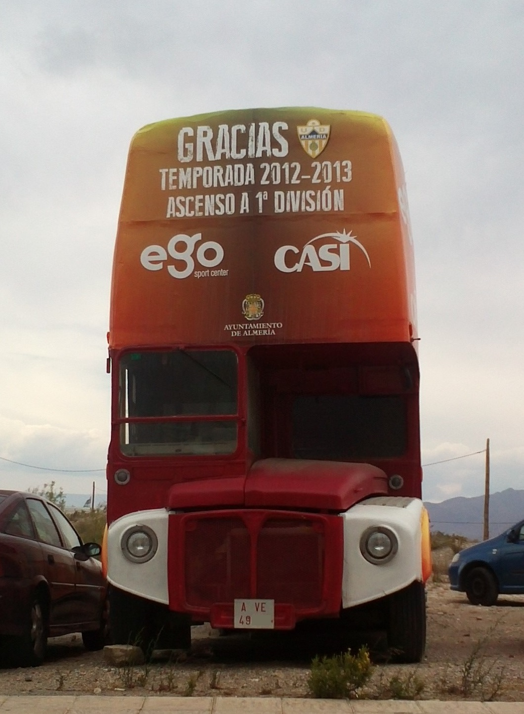 Bus londinense decorado para el ascenso de la UDA a primera división